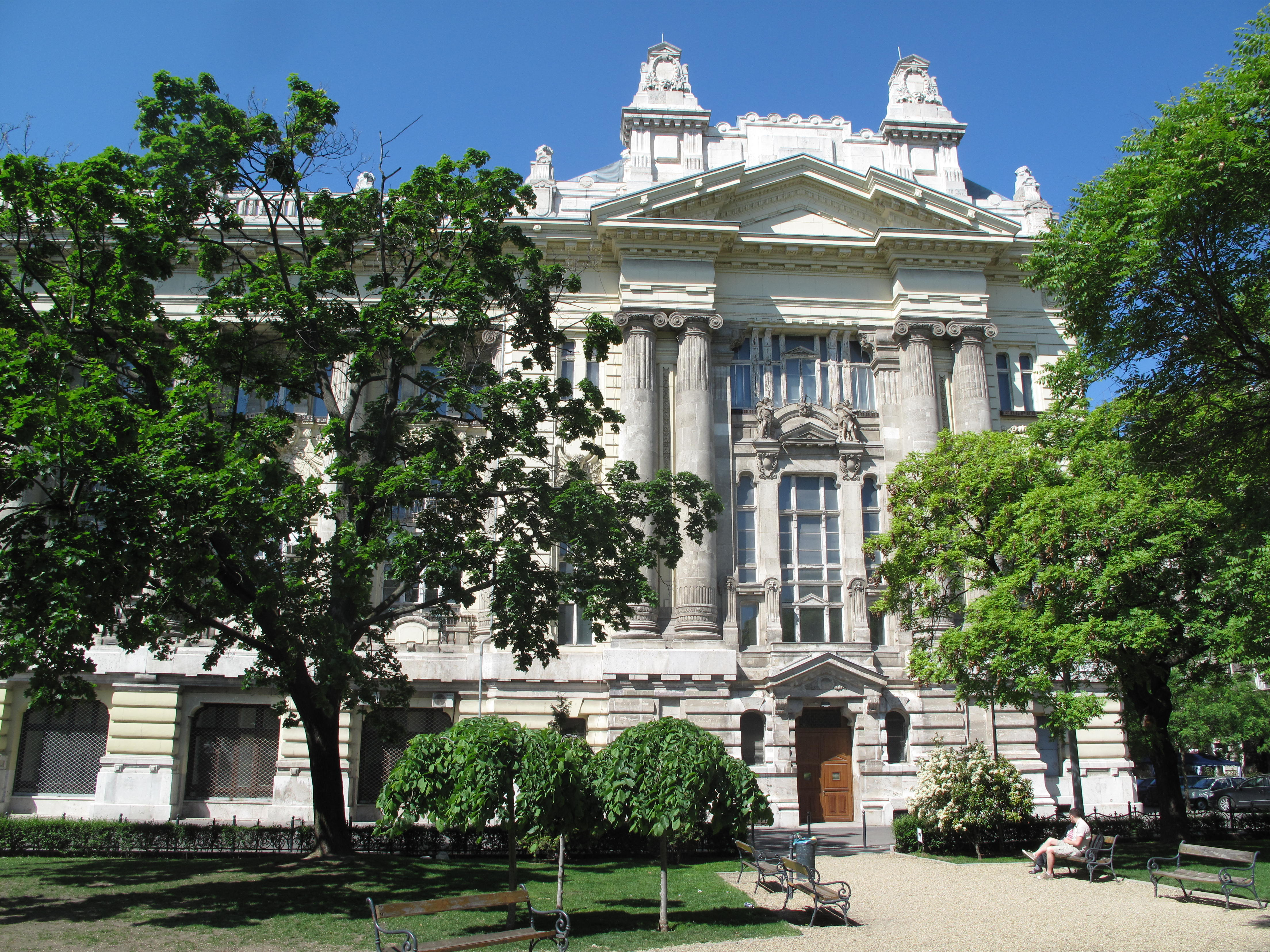 Budapešť